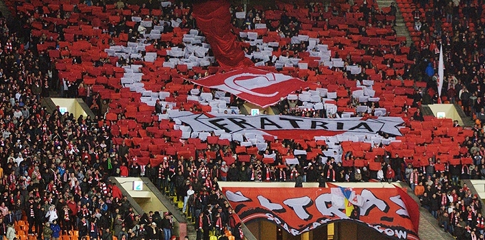 Перфоманс на день рожденья "Фратрии". 2010 год